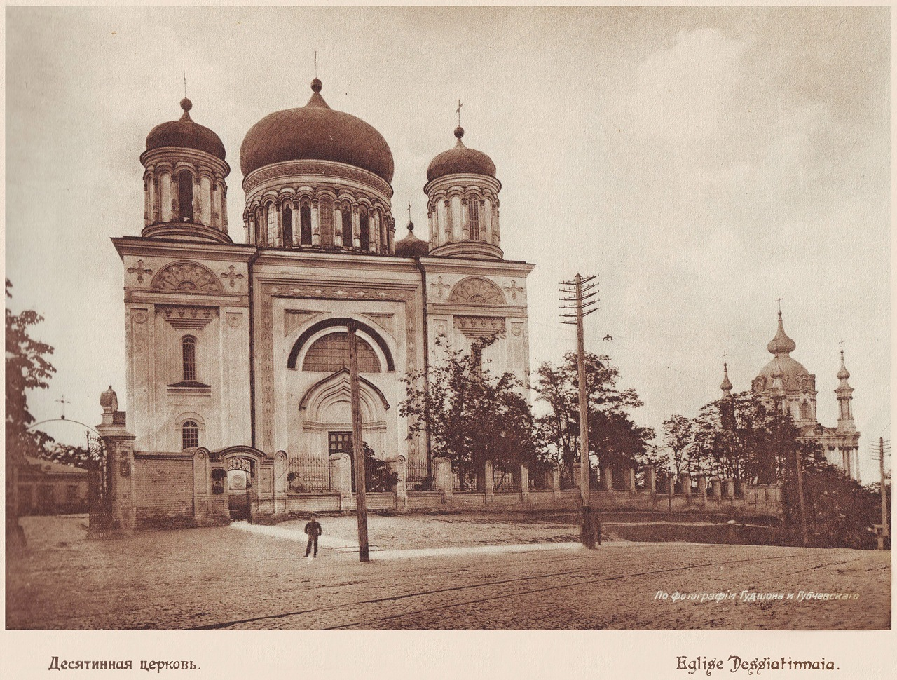 Десятинна церква (Church of the Tithes Kyiv) 1911